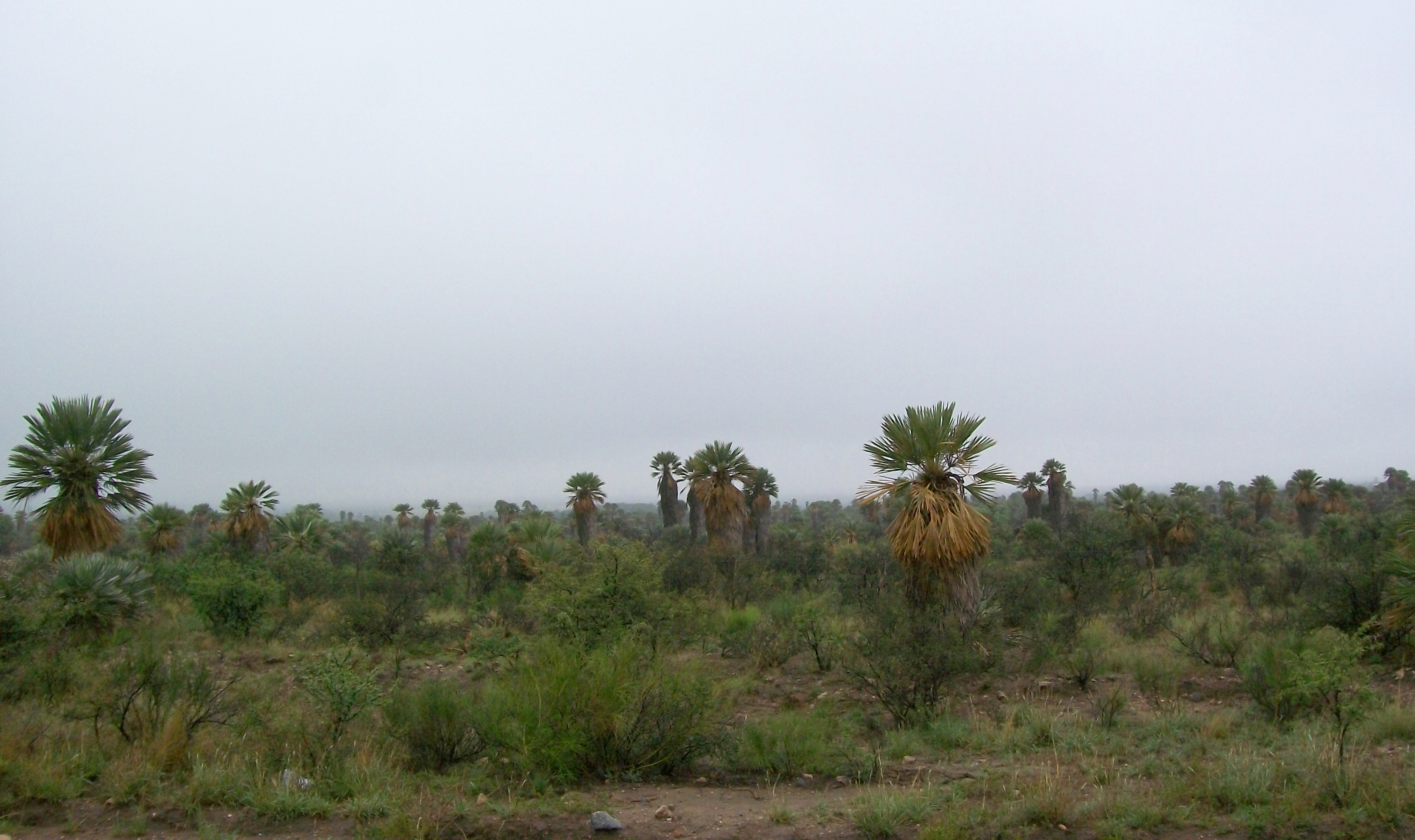 Palmares Caranday naturales en la zona no agrícola de la Pampa de Pocho, Traslasierra, Córdoba, Argentina